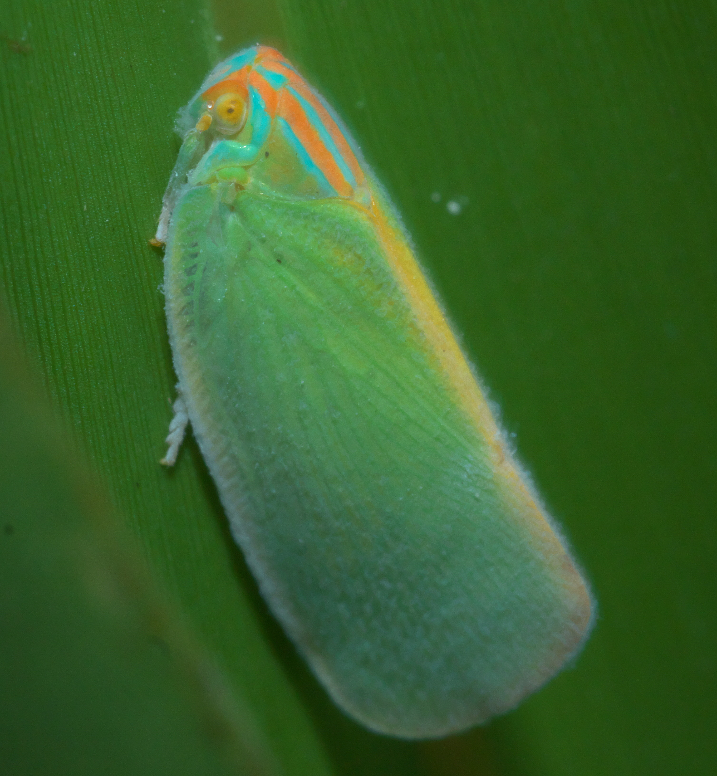 Ormenaria rufifascia, Palm Flatid Planthopper, Size: 10.7 mm, ID Confidence: 90